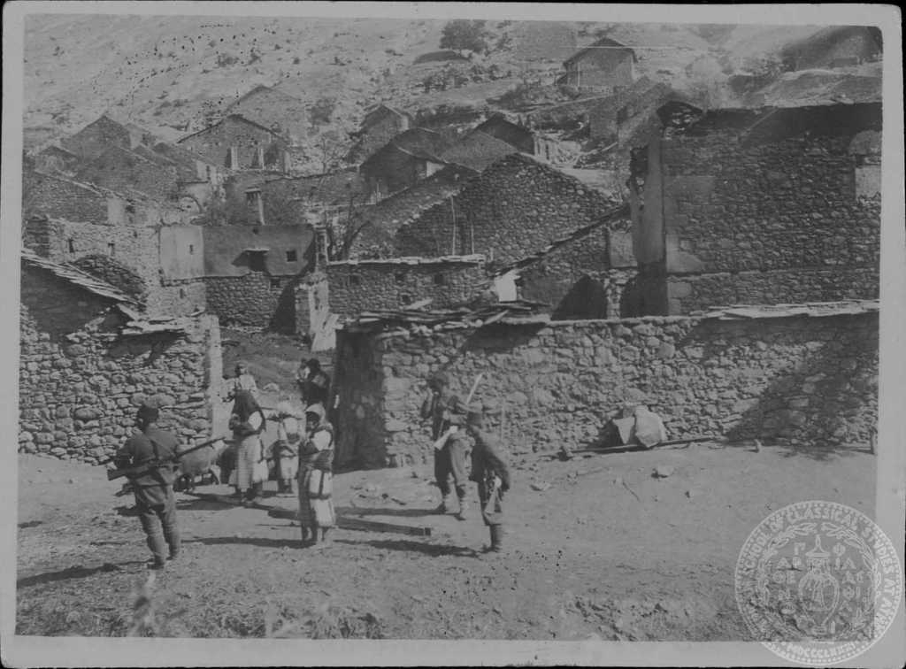 Градешница изгорена от чета на ВМОРО